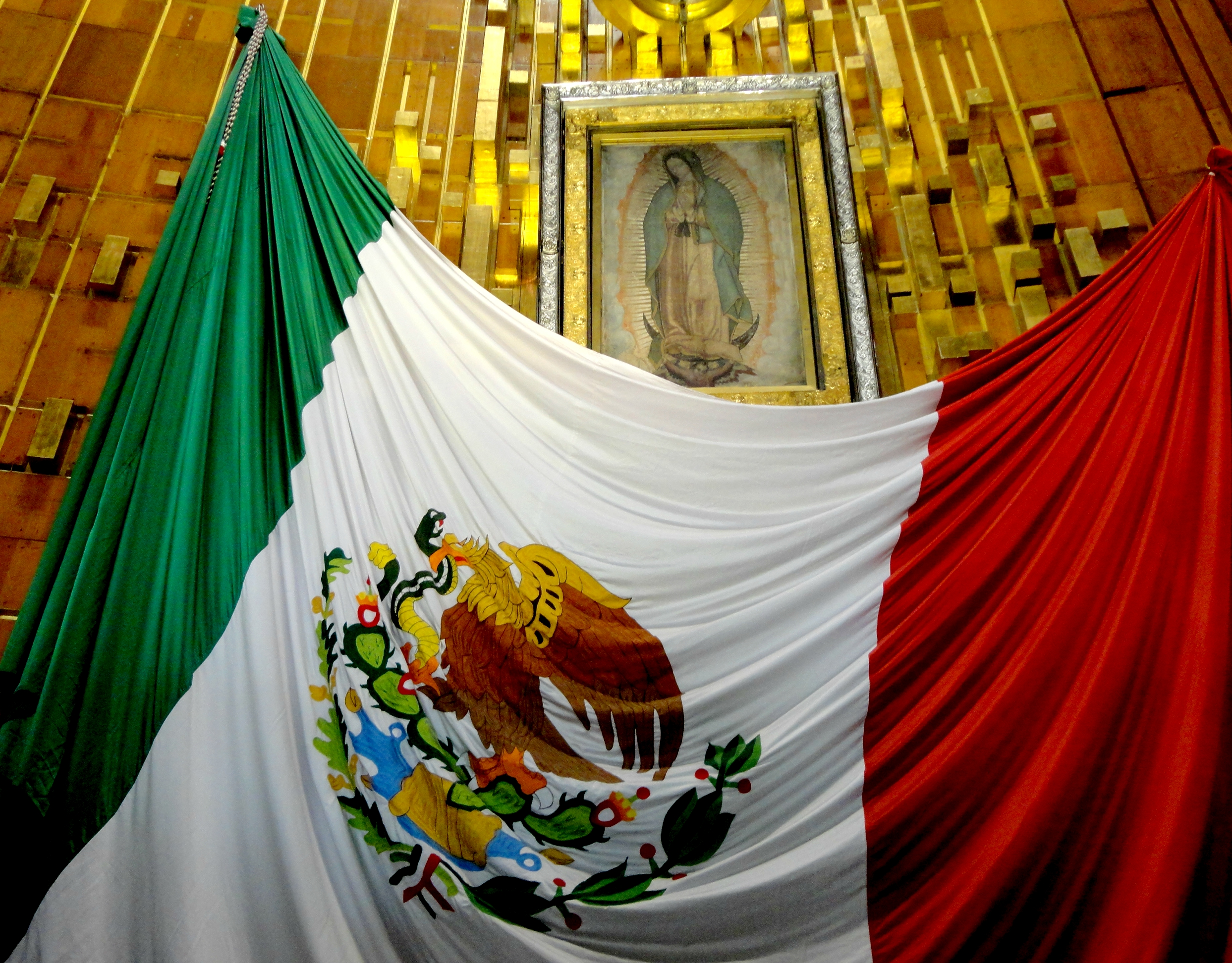 Tilma original de Nuestra Señora de Guadalupe en la Basílica, CDMX, México.